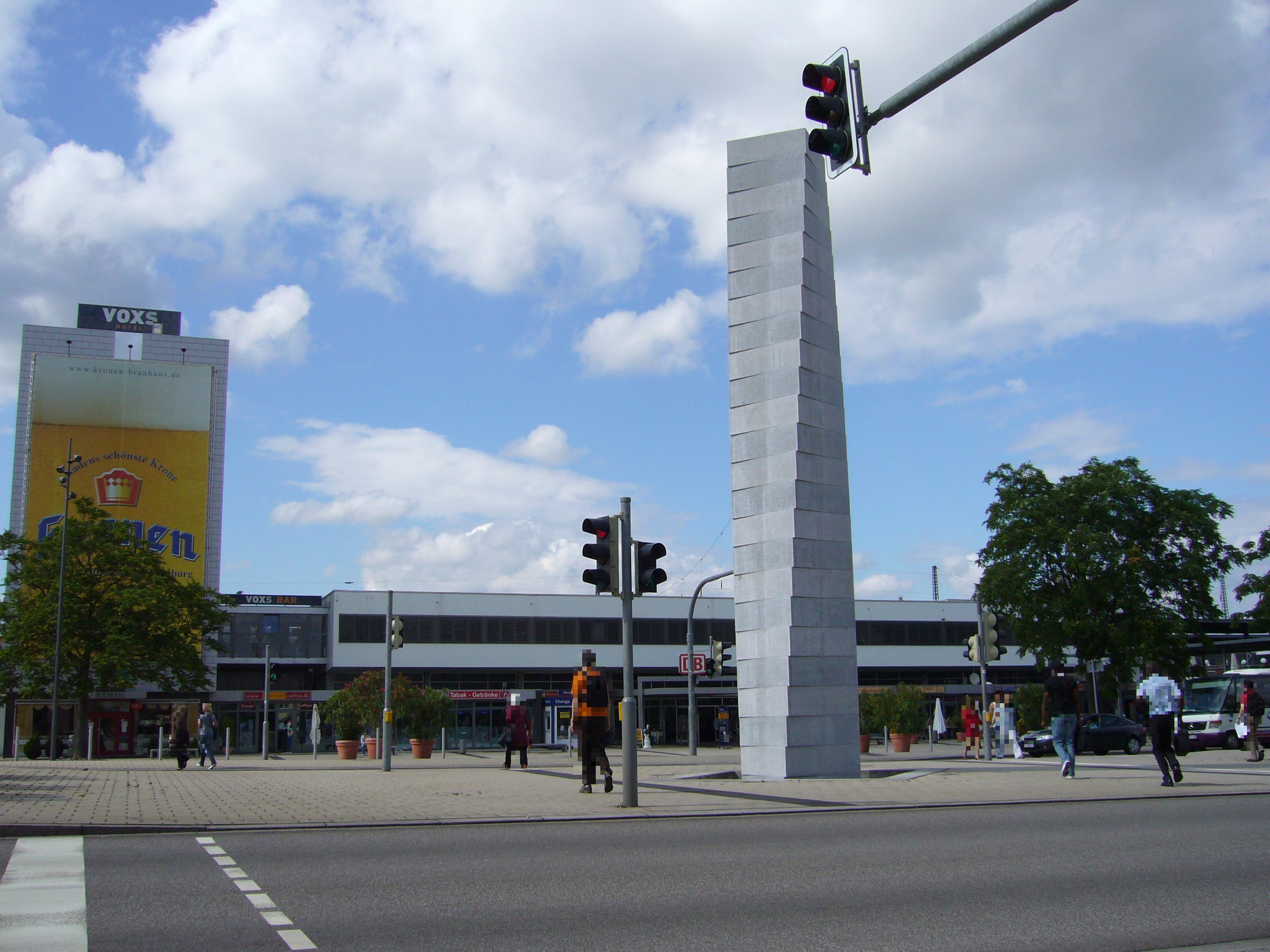 Gare de Kehl